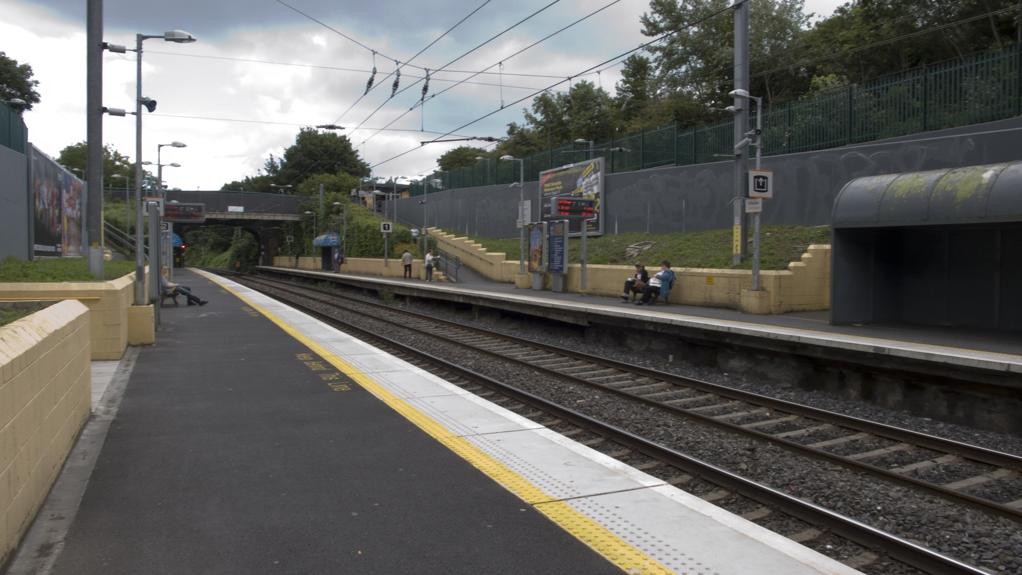 KILLESTER STATION - PHOTOGRAPHED USING LUMIX LX2